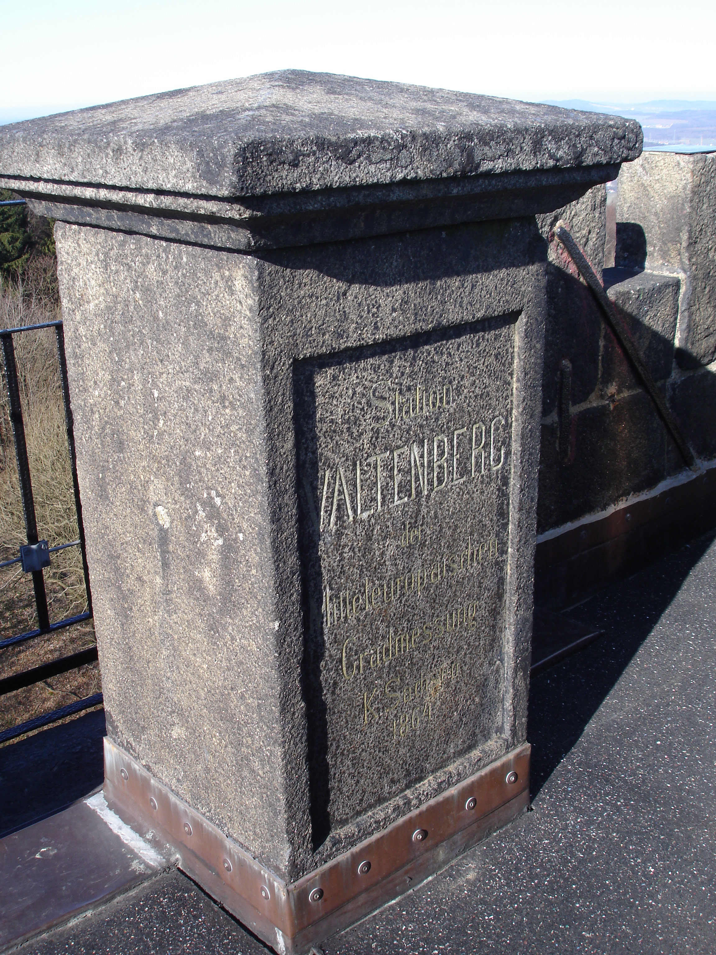 Vermessungssäule auf dem Valtenbergturm, Sachsen